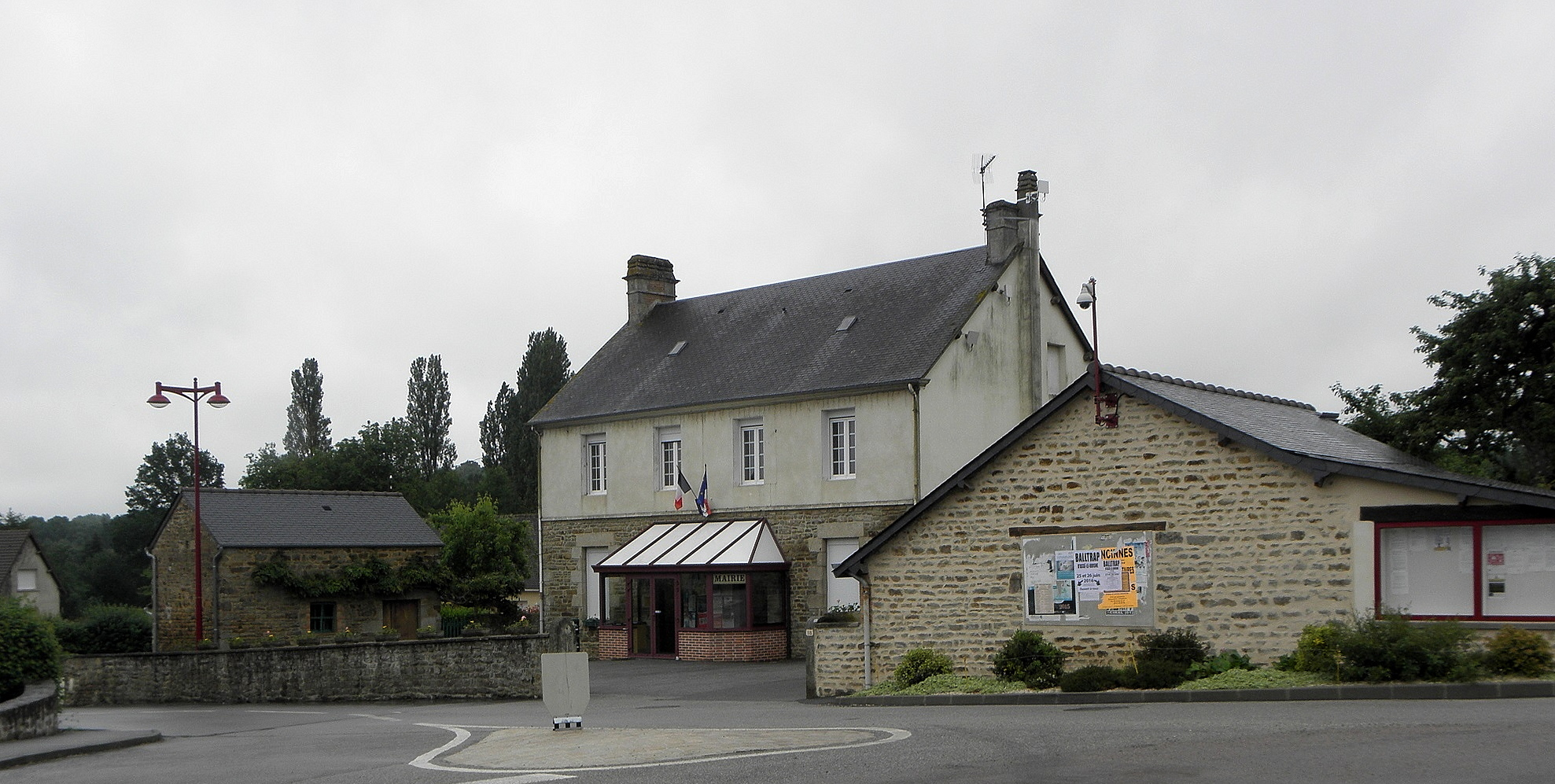 Mairie de La Ferrière-Bochard (61).